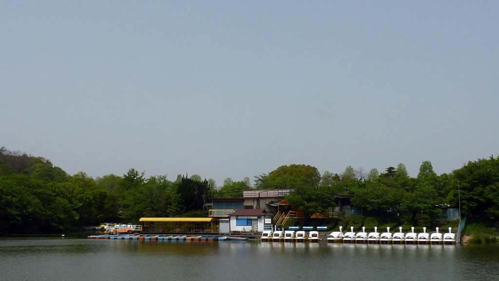 5月の大高緑地公園。